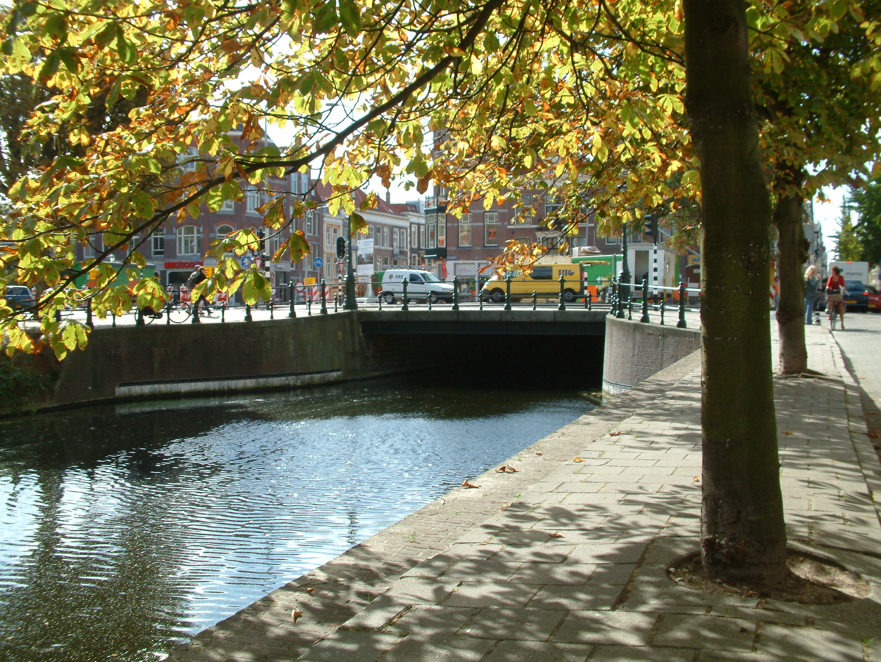 Brug in Den Haag